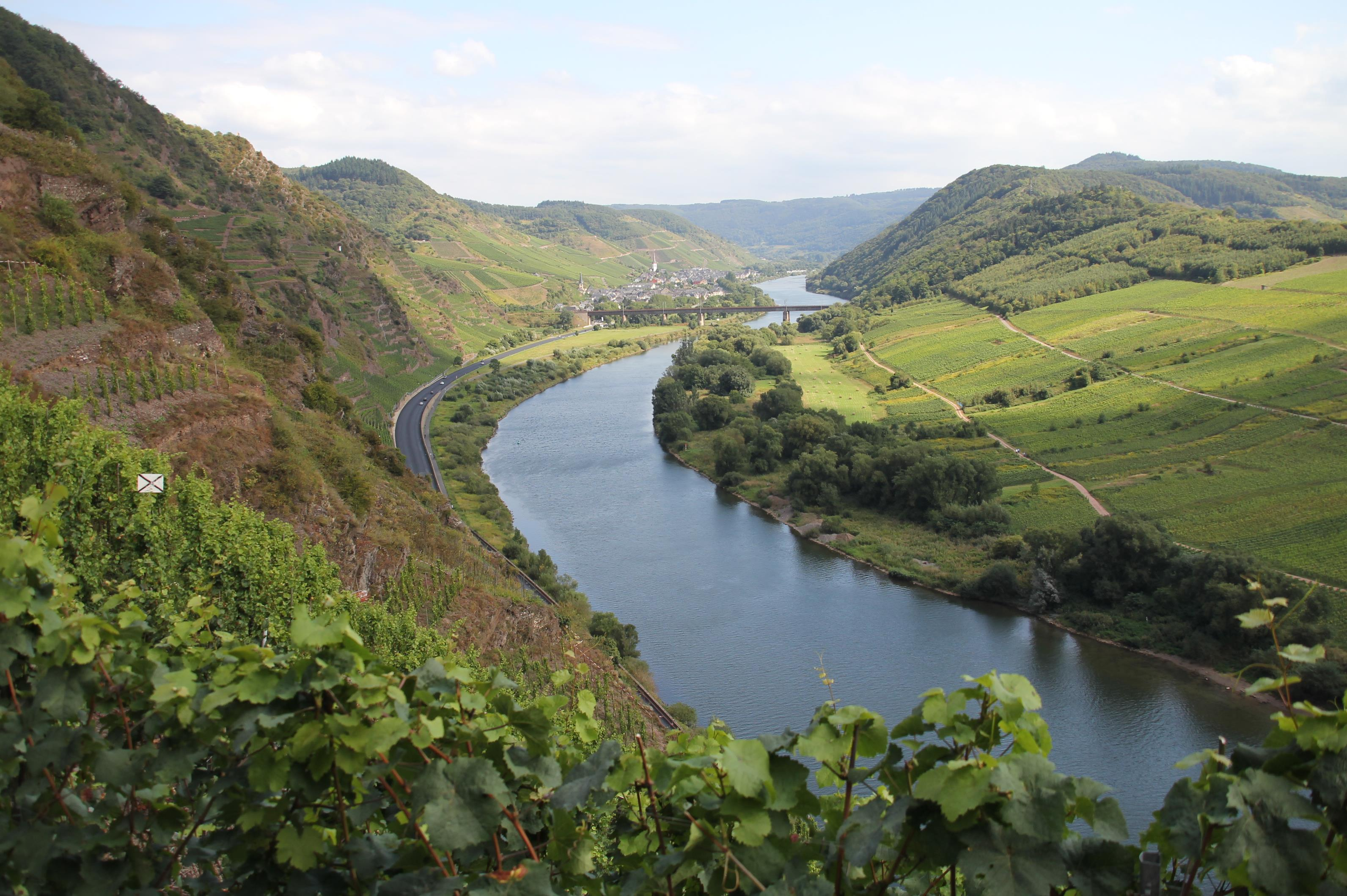 Das Moseltal flußabwärts aus dem Klettersteig bei Ediger-Eller gesehen.